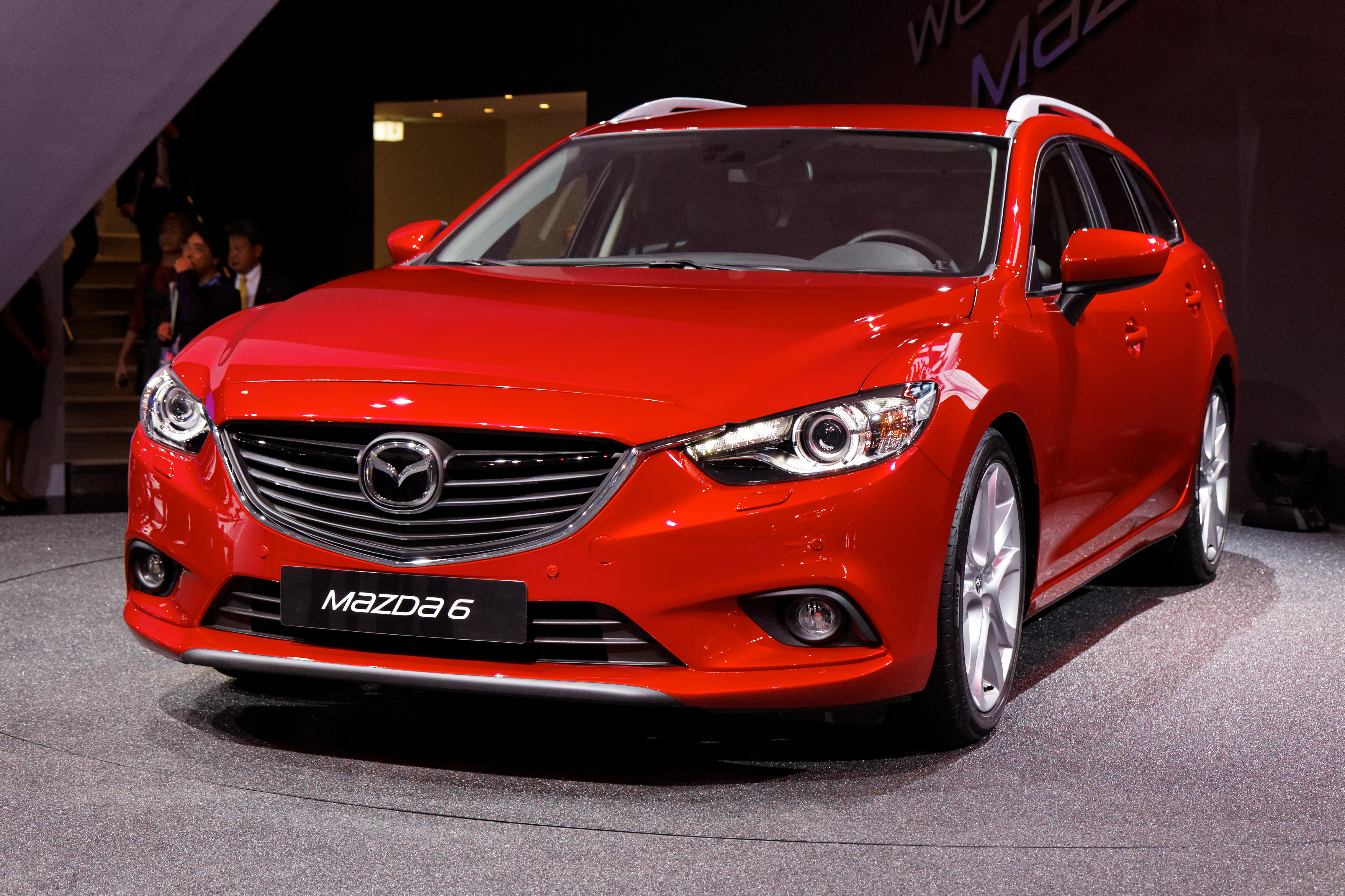 La Mazda 6 présentée lors du Mondial de l'automobile 2012 à Paris.